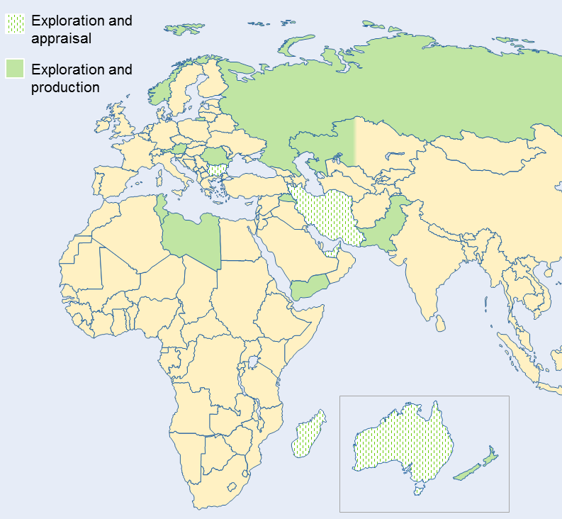 Upstream Portfolio OMV